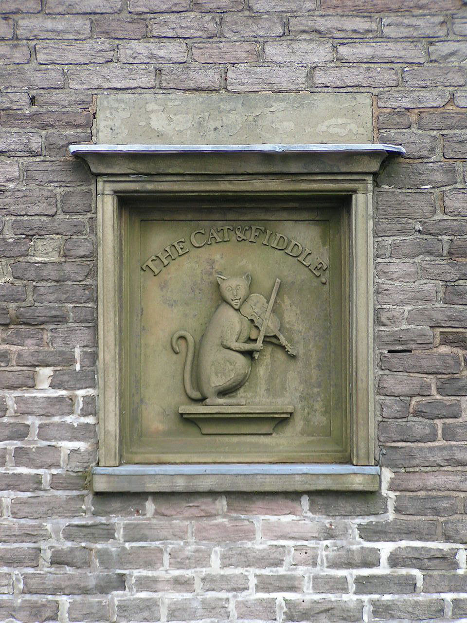 Cat and Fiddle plaque